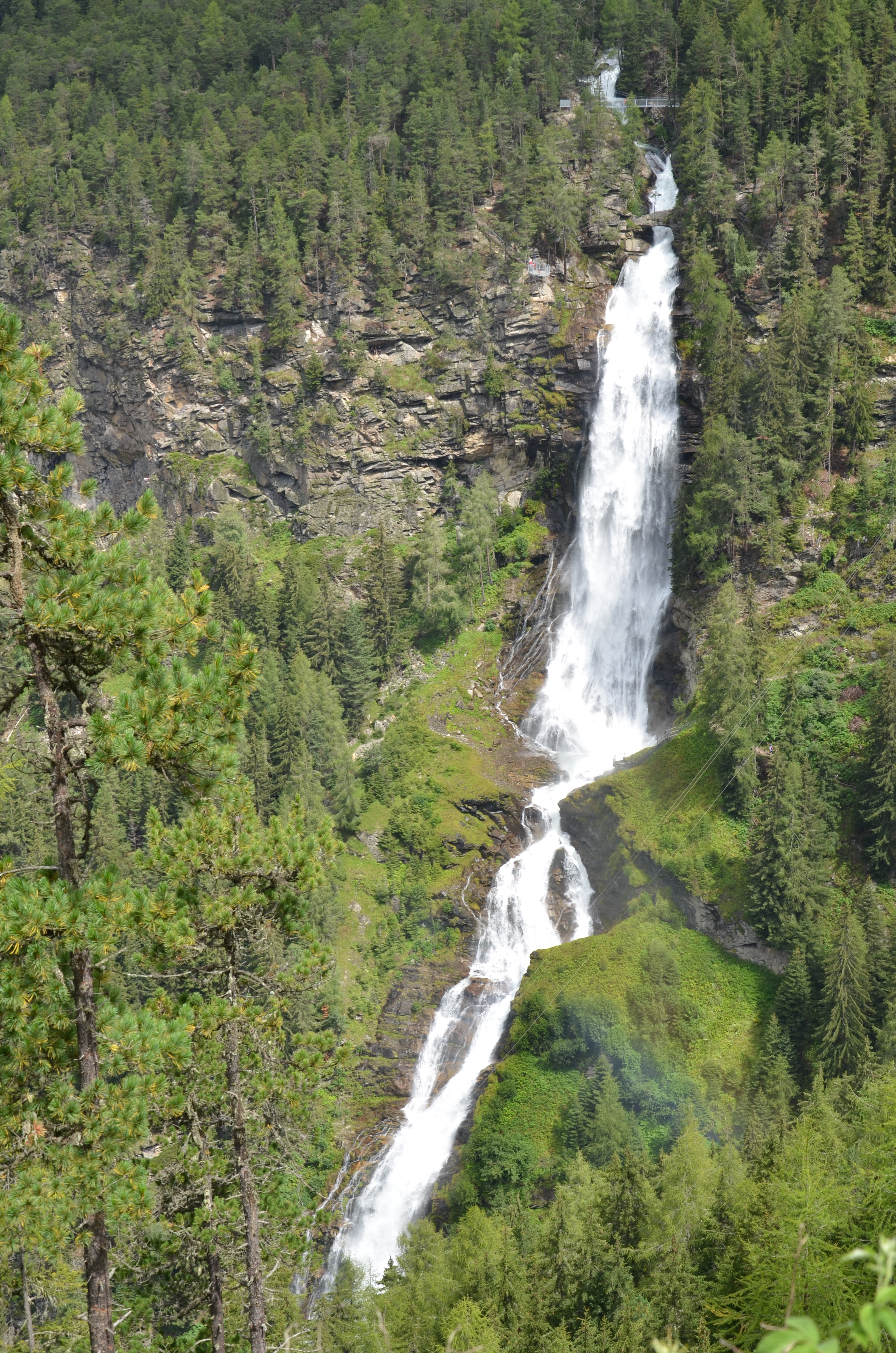 Stuibenfall in Tirol , Ansicht vom gegenüberliegenden Aussichtspunkt